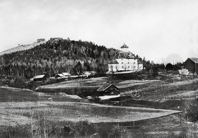 Hunn gamle kirke med Tranberg gård i bakgrunnen